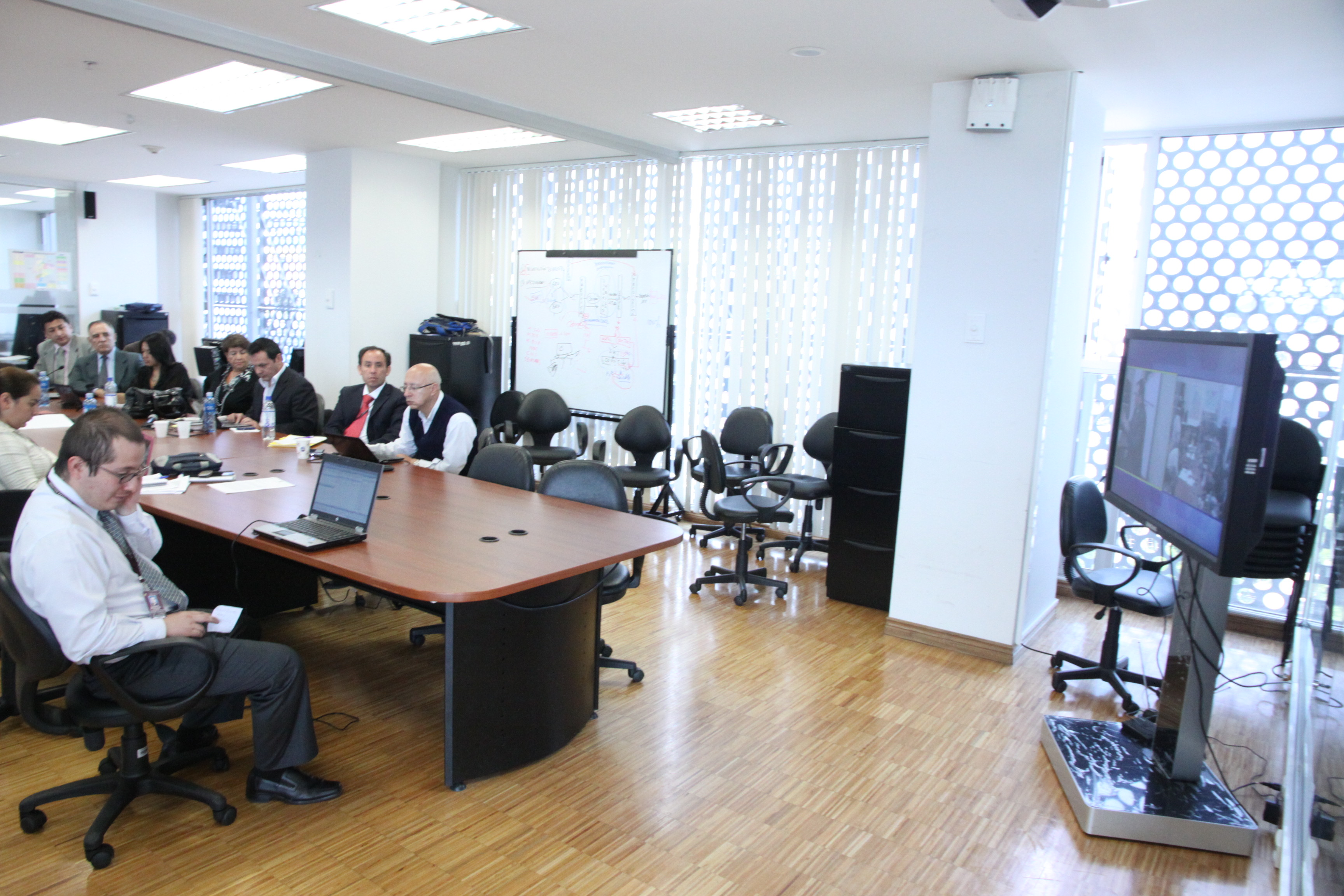 Foto: Hugo Ortiz Ron / Asamblea Nacional